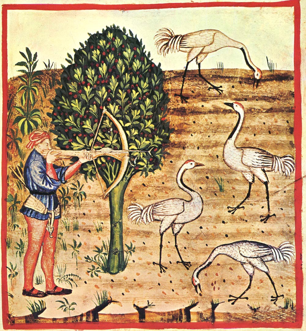 Tacuina sanitatis (XIV century) 5-caccia gru,Taccuino Sanitatis, Casanatense 4182, tav. 133.